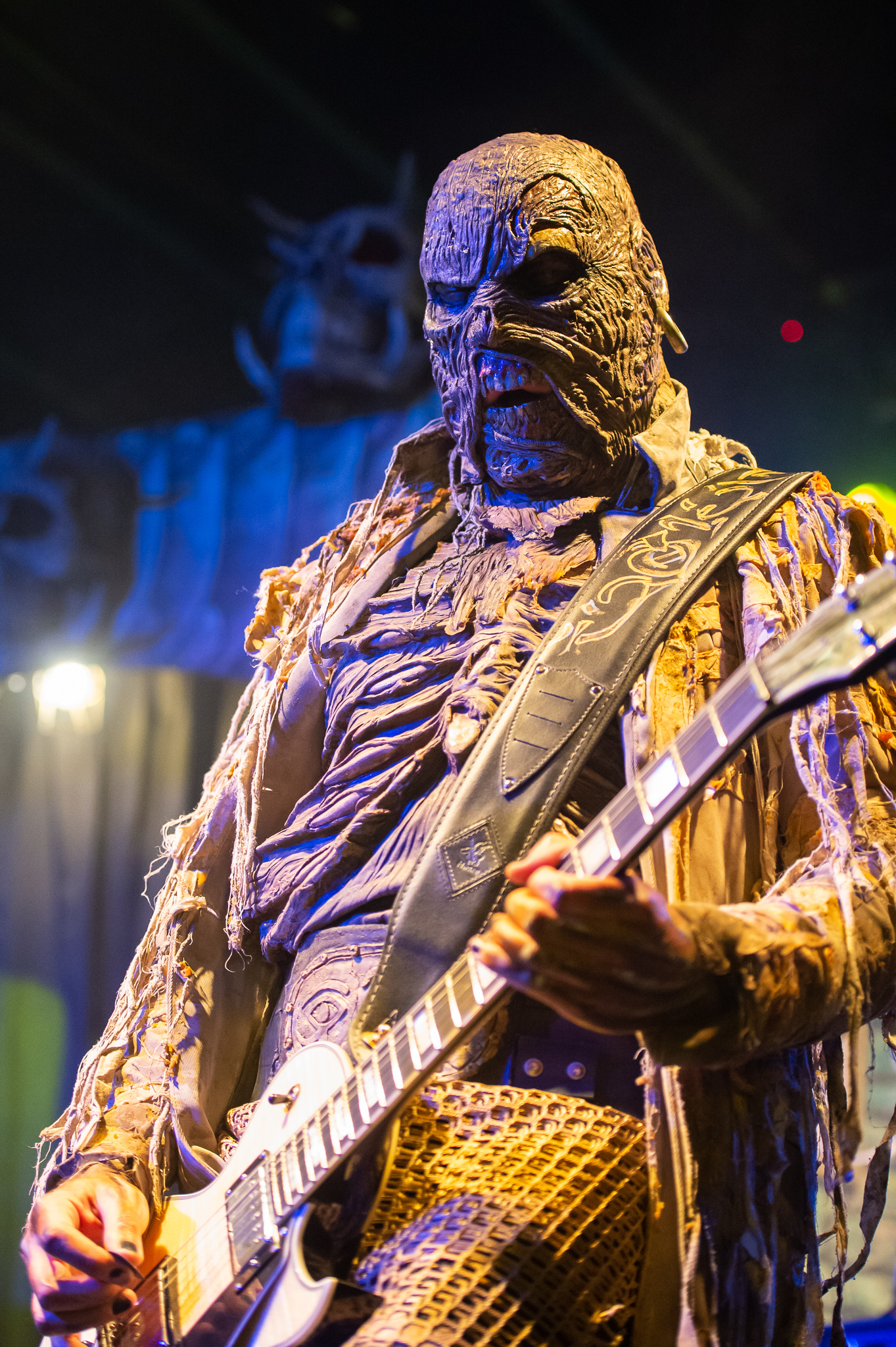 Amen,Concertbüro Franken,Der Hirsch,Jussi Antero Sydänmaa,Konzert,Livekonzert,Livemusik,Lordi,Musik